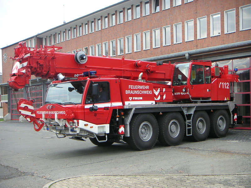 Feuerwehrkran 60-4 der Berufsfeuerwehr Braunschweig Urheber: Stadt Braunschweig - Fachbereich Feuerwehr